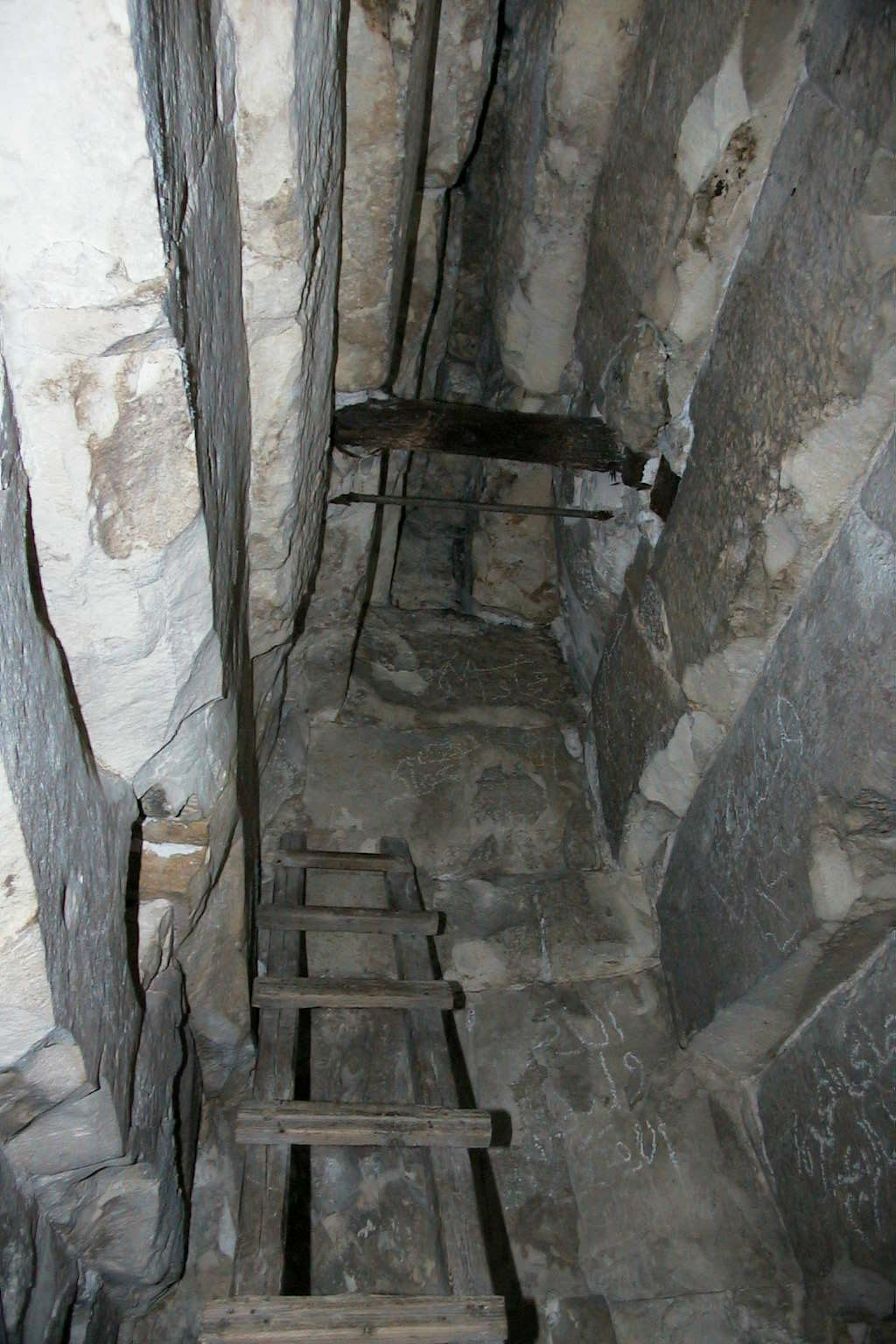 Das Gewölbe in der zentralen Kammer der Pyramide von Meidum. Fotografiert am 09.06.2002 Das Fotos wurde von mir selbst erstellt und ist im Originalzustand (also nicht bearbeitet) Weitere Fotos unter